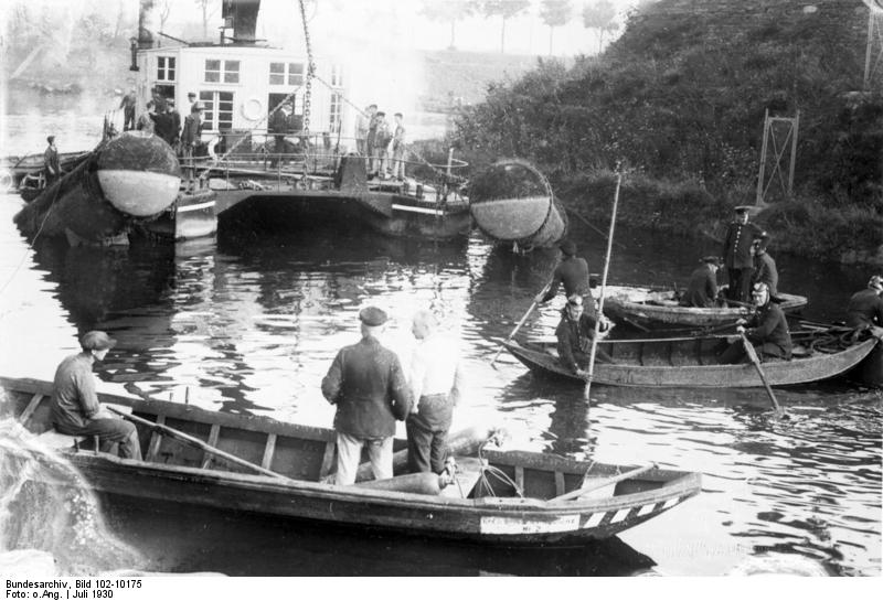 Die furchtbare Brückeneinsturz-Katastrophe in Koblenz! Erste Aufnahmen von den Bergungsarbeiten an der Unglücksstelle. - Blick auf die Unglücksstelle der fruchtbaren Brückeneinsturz-Katastrophe in Koblenz. Feuerwehrleute suchen das Wasser nach den Toten ab.